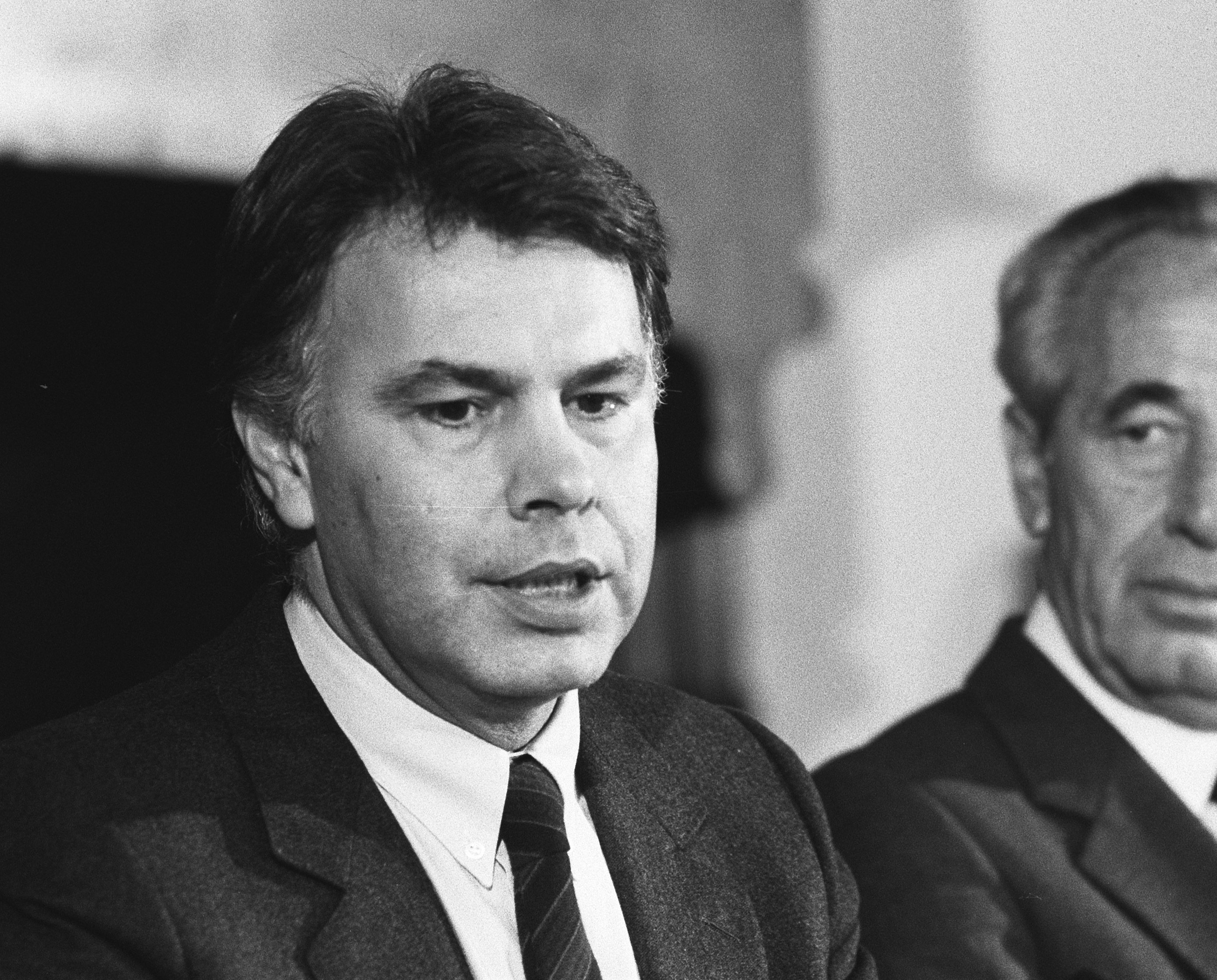 Peres (rechts) en Gonzalez (links) 19 januari 1986